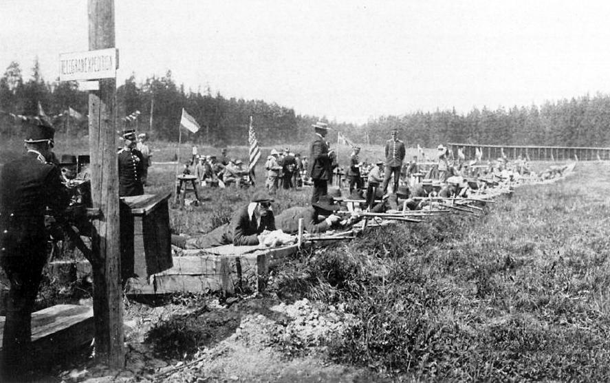 Compétition du tir au fusil, JO 1908 (Kaknas).